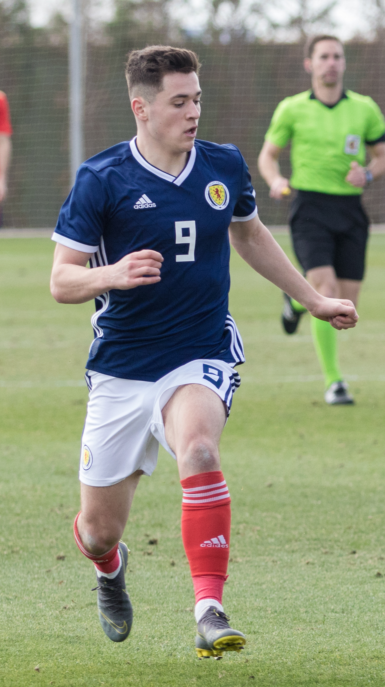 espana-escocia-sub19-62